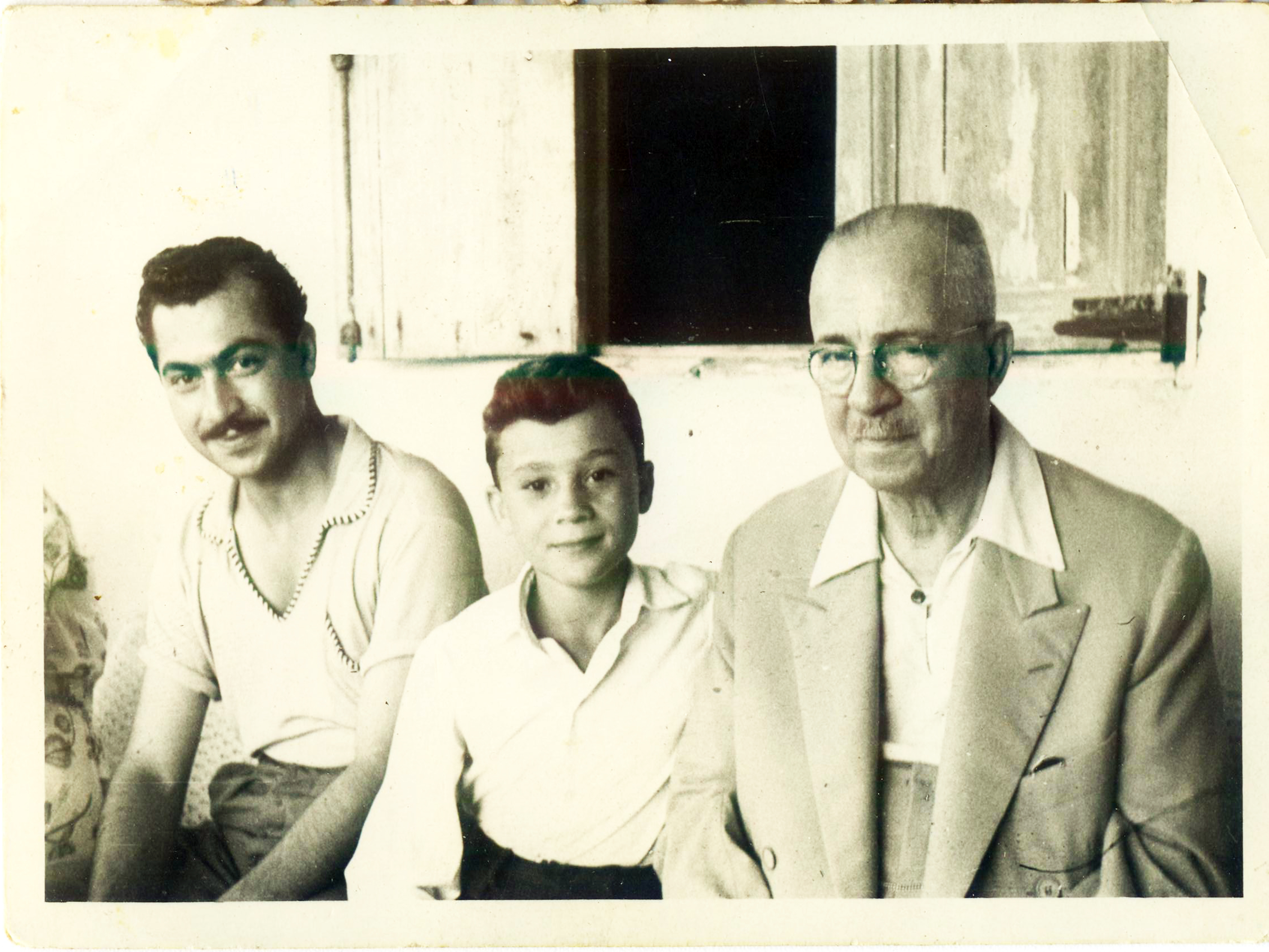 من اليمين: محمد فهيم الجندى - أولاده: سعيد-الشهيد: مختار